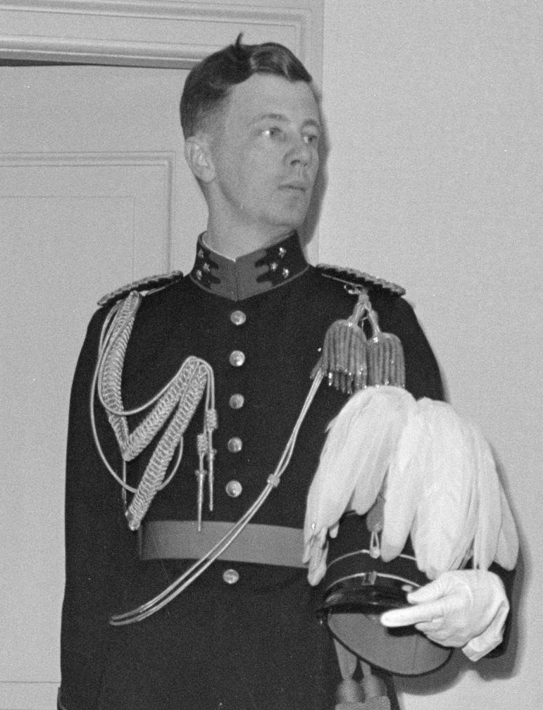 Collectie / Archief : Fotocollectie Van de Poll Reportage / Serie : Troonsafstand koningin Wilhelmina / Inhuldiging van koningin Juliana Beschrijving : Adjudant van koningin Juliana in groottenue: Reserve-kapitein J.C. Bührmann. De heer Bührmann was een van de vier dragers van de sleep van de koningsmantel tijdens de Inhuldigingsplechtigheid op maandagochtend 6 september. Datum : 6 september 1948 Locatie : Amsterdam, Noord-Holland Trefwoorden : inhuldigingen, koninklijk huis, officieren, portretten Persoonsnaam : Bührmann, J. C. Fotograaf : Poll, Willem van de Auteursrechthebbende : Nationaal Archief Materiaalsoort : Negatief (zwart/wit) Nummer archiefinventaris : bekijk toegang 2.24.14.02 Bestanddeelnummer : 255-7130